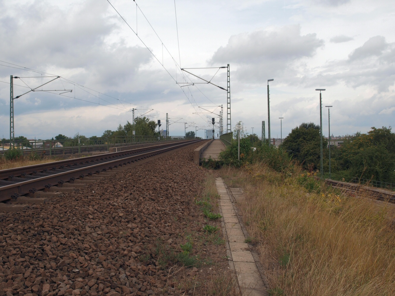 Die Containerbahnhofbrücke in Mannheim, Teil der Schnellfahrstrecke Mannheim-Stuttgart, von Osten